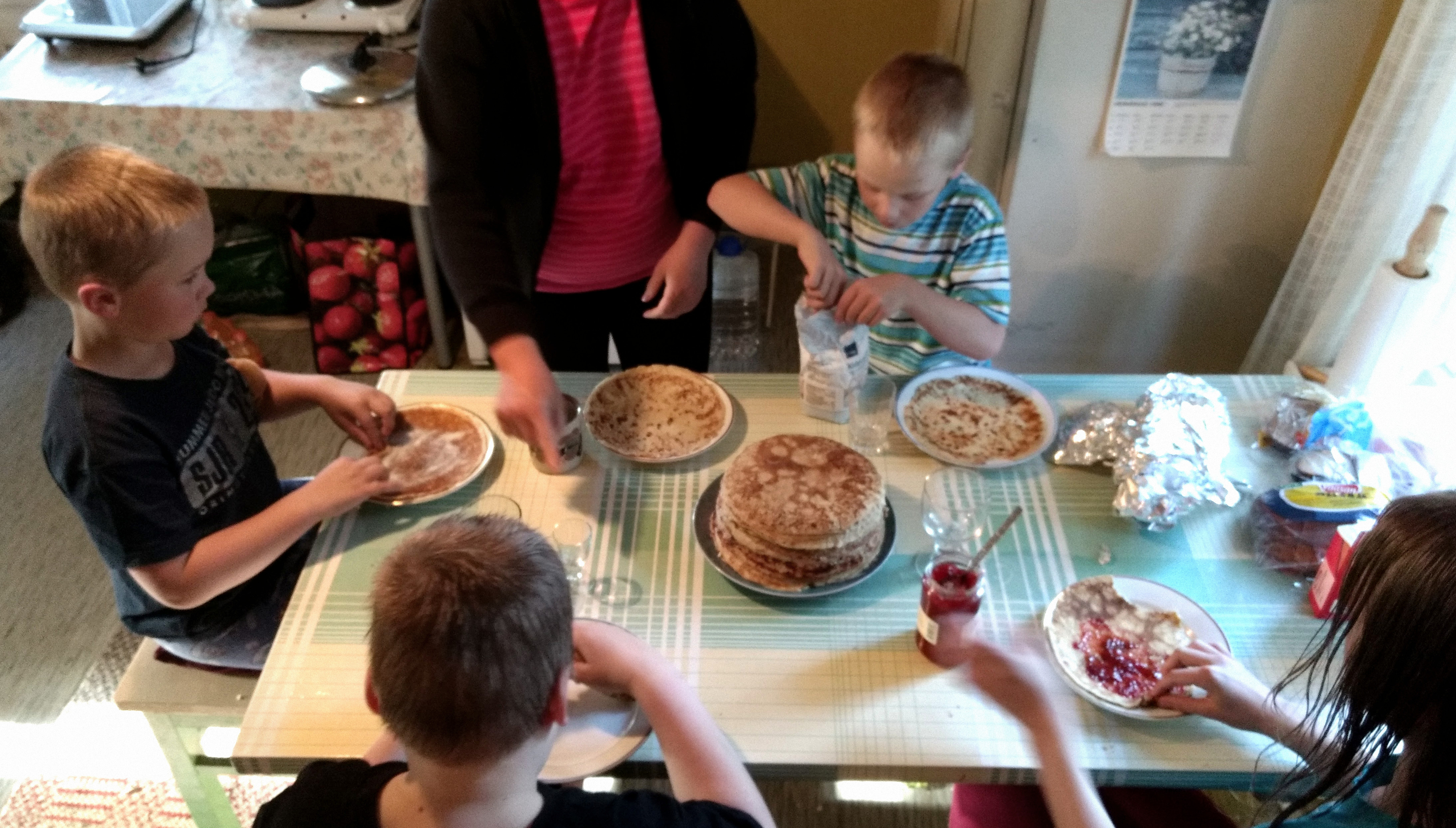 Letunsyönti on lasten juhlaa